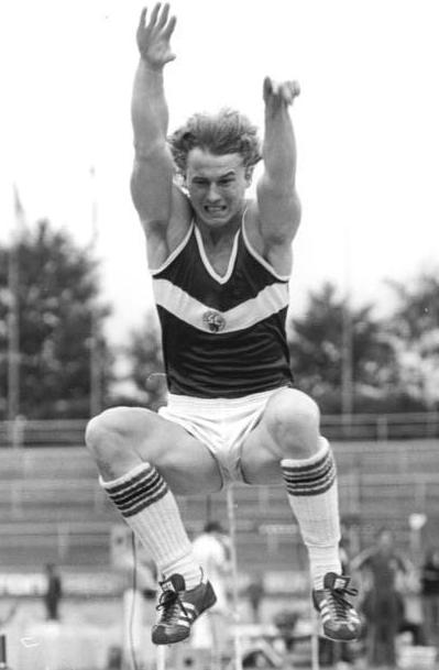 Factual corrections and alternative descriptions are encouraged separately from the original description. Additionally errors can be reported at this page to inform the Bundesarchiv. Original historic description: Lutz Dombrowski ADN-ZB Häßler 5.7.80 Dresden: Lutz Dombrowski (SC Karl-Marx-Stadt-Foto) egalisierte bei Leichtathletik-Wettbewerben in Dresden mit 8,45 m den Weitsprung -Europarekord des Jugoslawen Nanad Stekic aus dem Jahre 1975 und verbesserte die DDR-Rekordmarke von Frank Paschek um neun Zentimeter. Er erzielte die Weite bei zulässigem Rückenwind von 1,9 m-s im fünften Versuch. Seine bisherige Bestleistung stand bei 8,31 m.